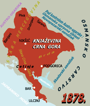 Knjazevina Crna Gora 1878 godine